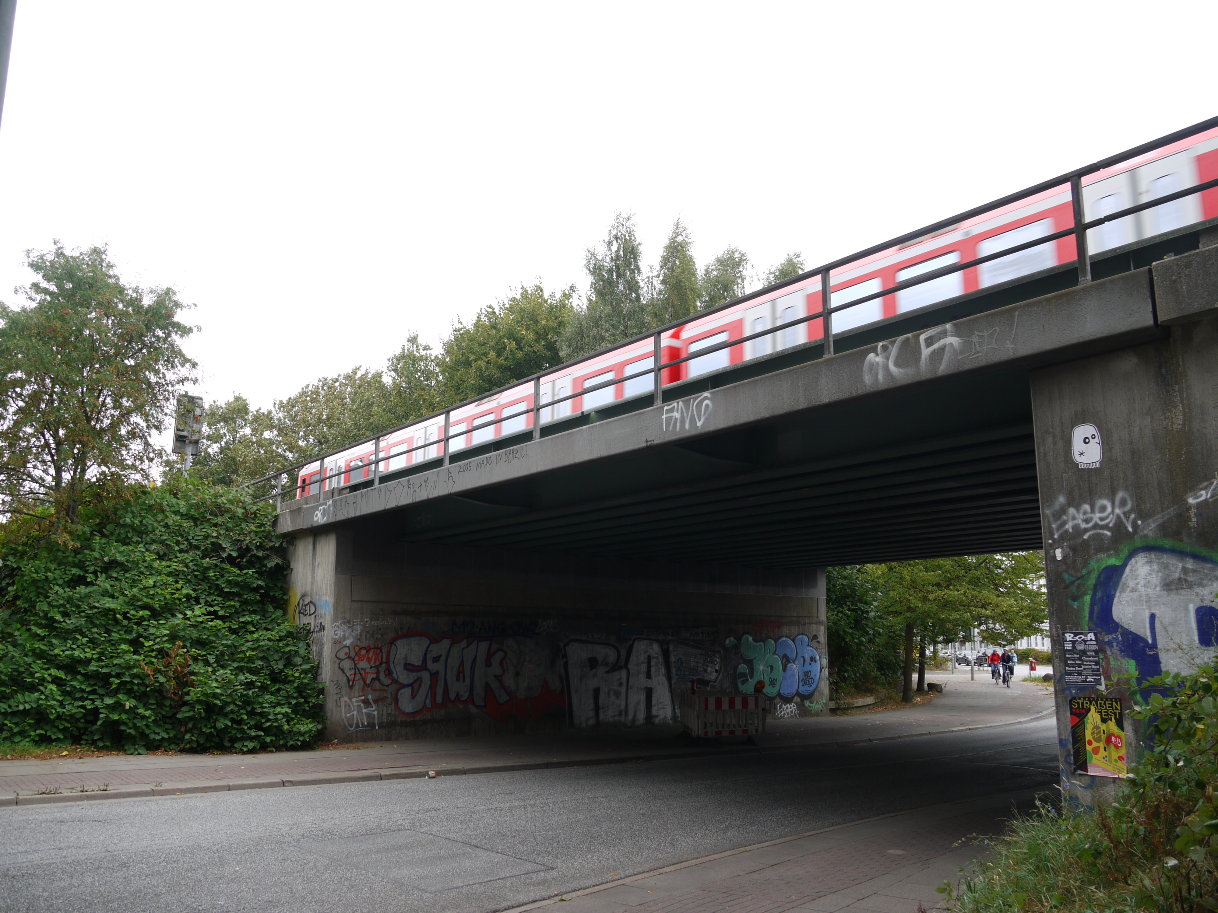 Straßenunterführung am Bahrenfelder Steindamm in Hamburg im August 2014, geplanter Ostzugang der geplanten S-Bahnstation Ottensen.